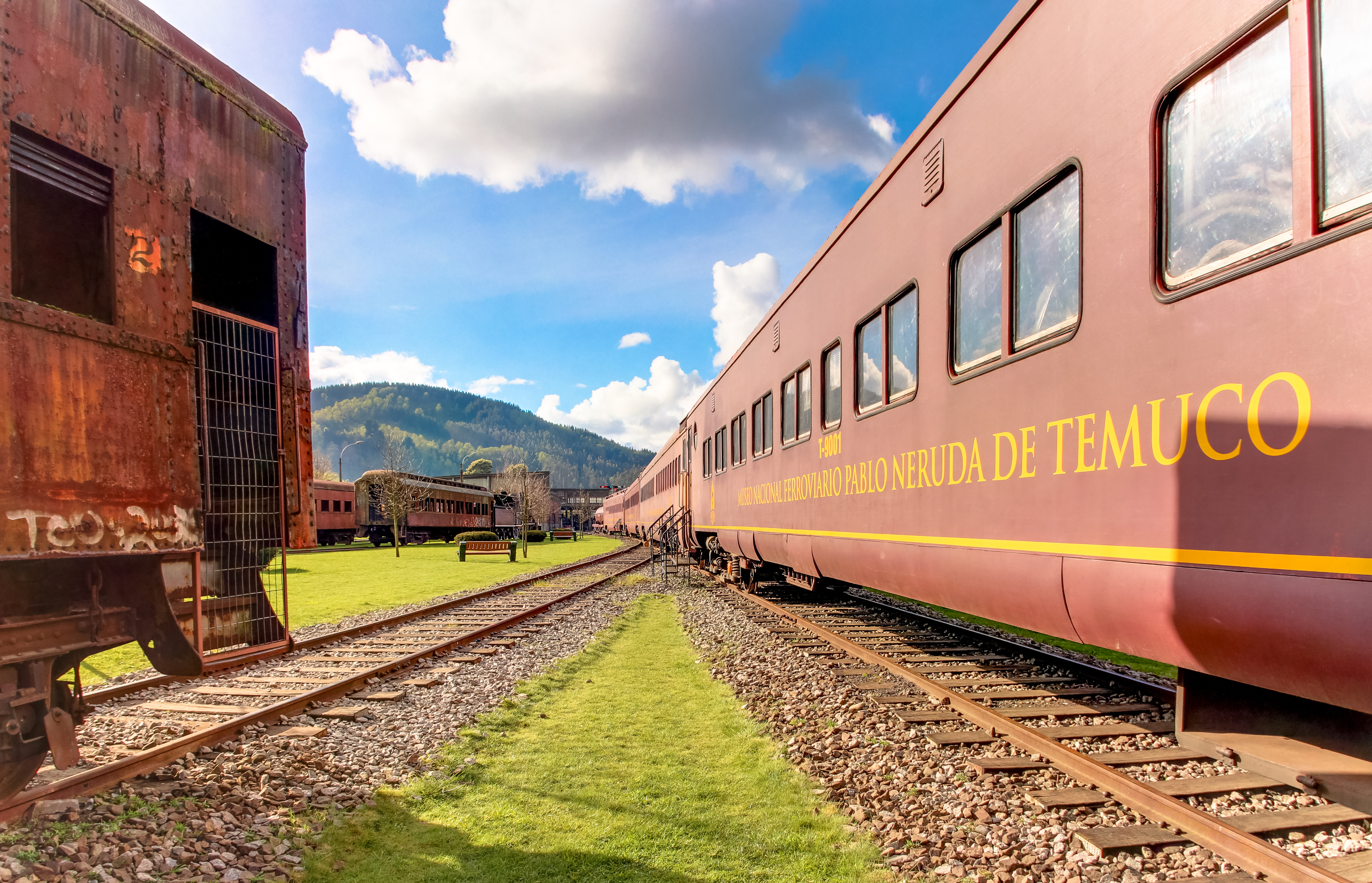 Trenes en el Museo Nacional Ferroviario Pablo Neruda de Temuco, Chile This is a photo of a national monument in Chile: 161